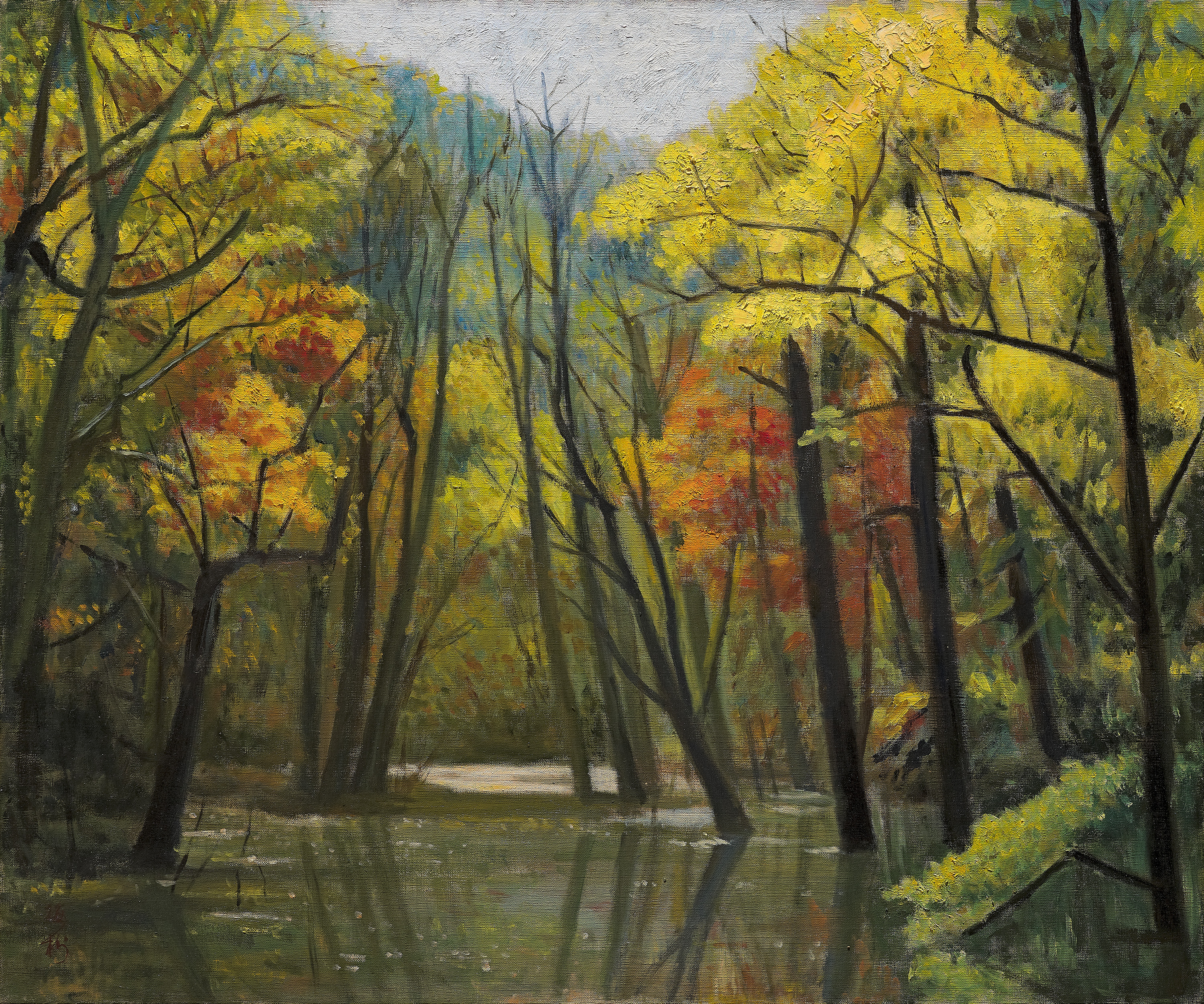 中文（台灣）: 李梅樹作品：楓樹林，1978，油彩 畫布。